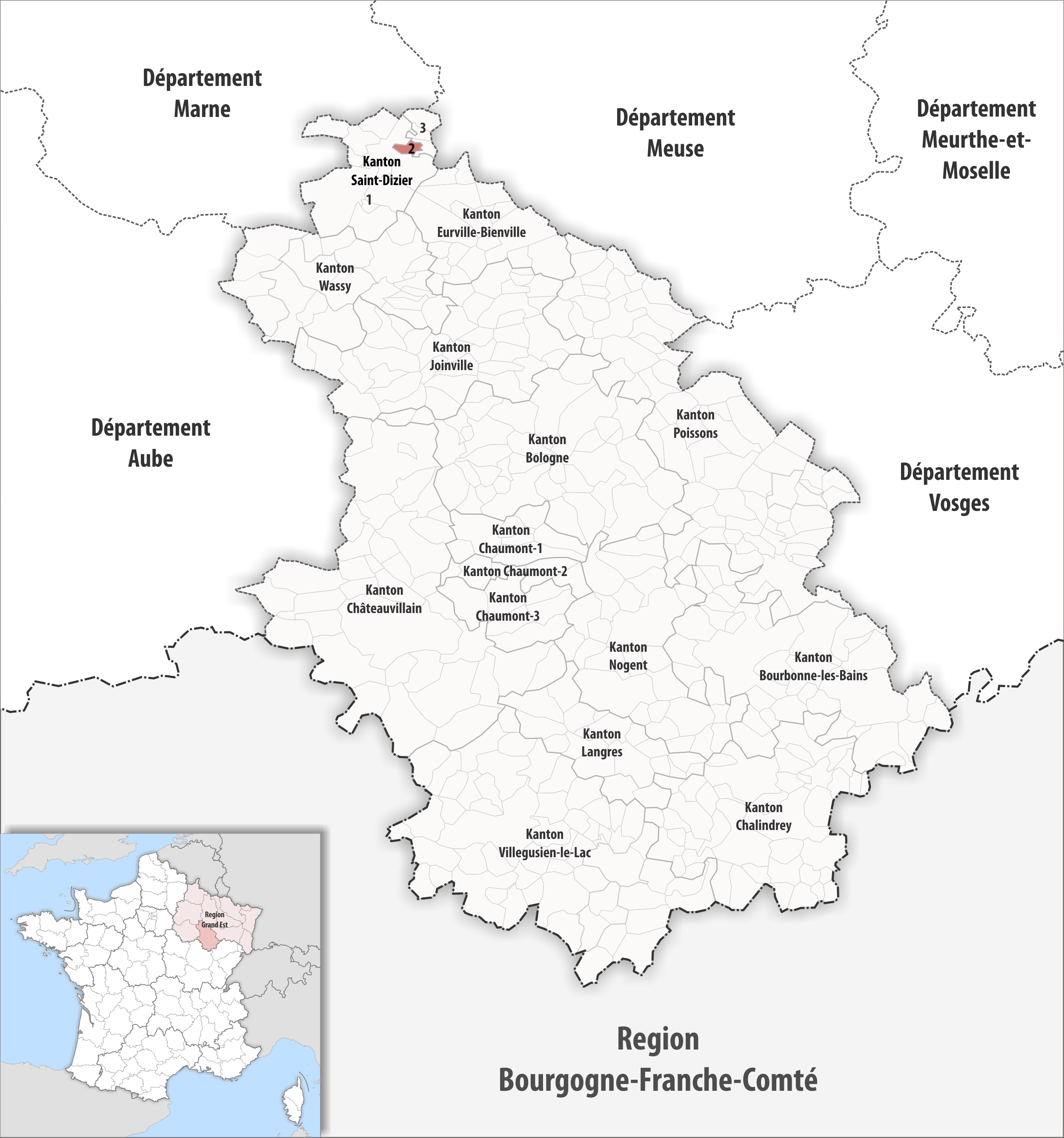 Lage des Kantons Saint-Dizier-2